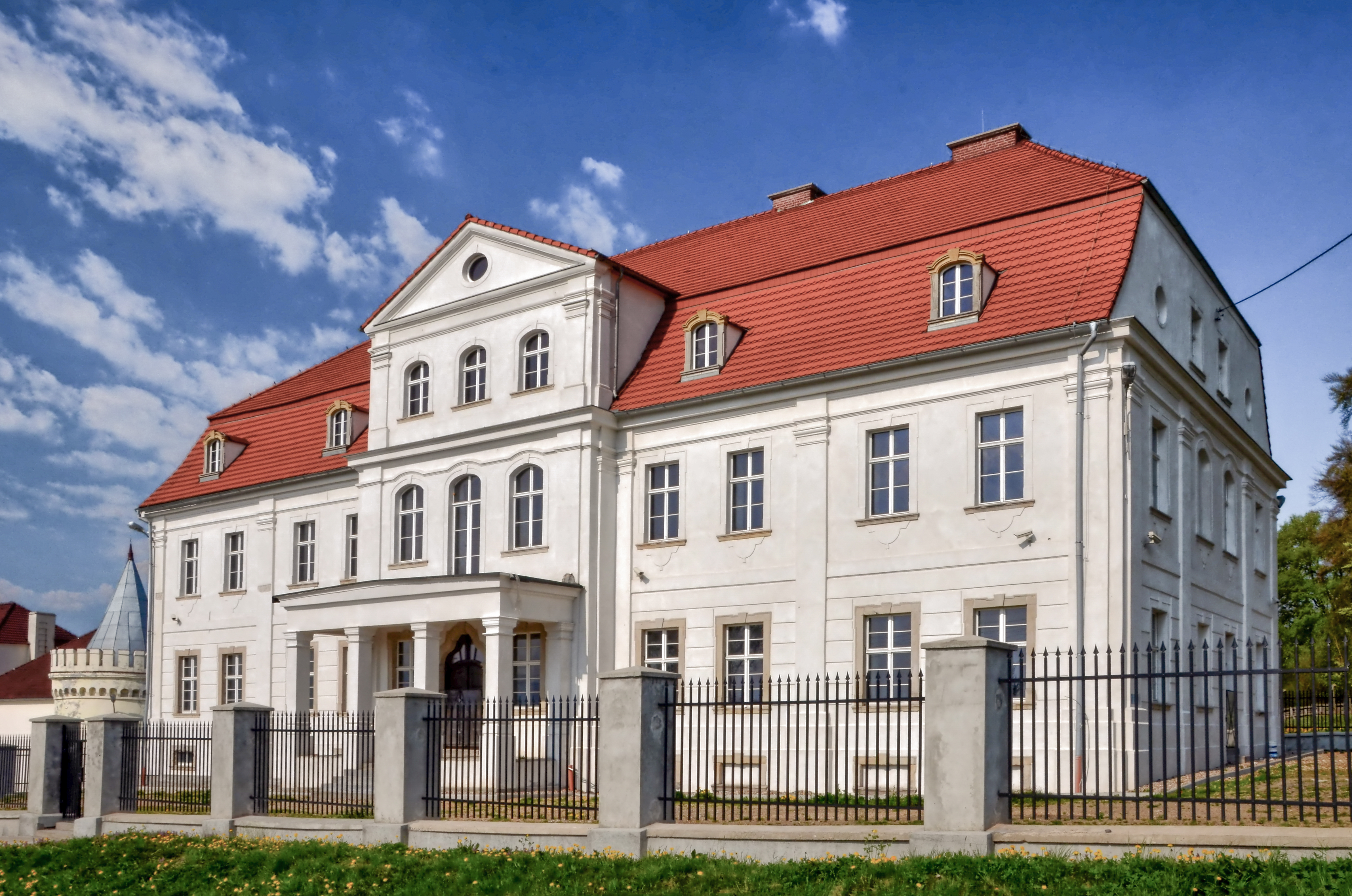 Elewacja frontowa pałacu w Proszówce wzniesionego w latach 1798-1800, restaurowanego w XIX i XX w. (zabytek nr A/855/519/J z 13.03.1978)